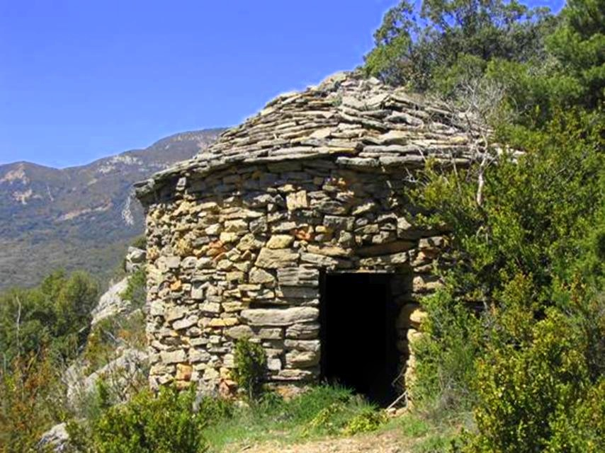 Caseta de pastores, utilizada en la antigüedad para guarecerse de las tormentas o pasar la noche. Se encuentra situada en el camino de acceso a la ermita de Ordás.